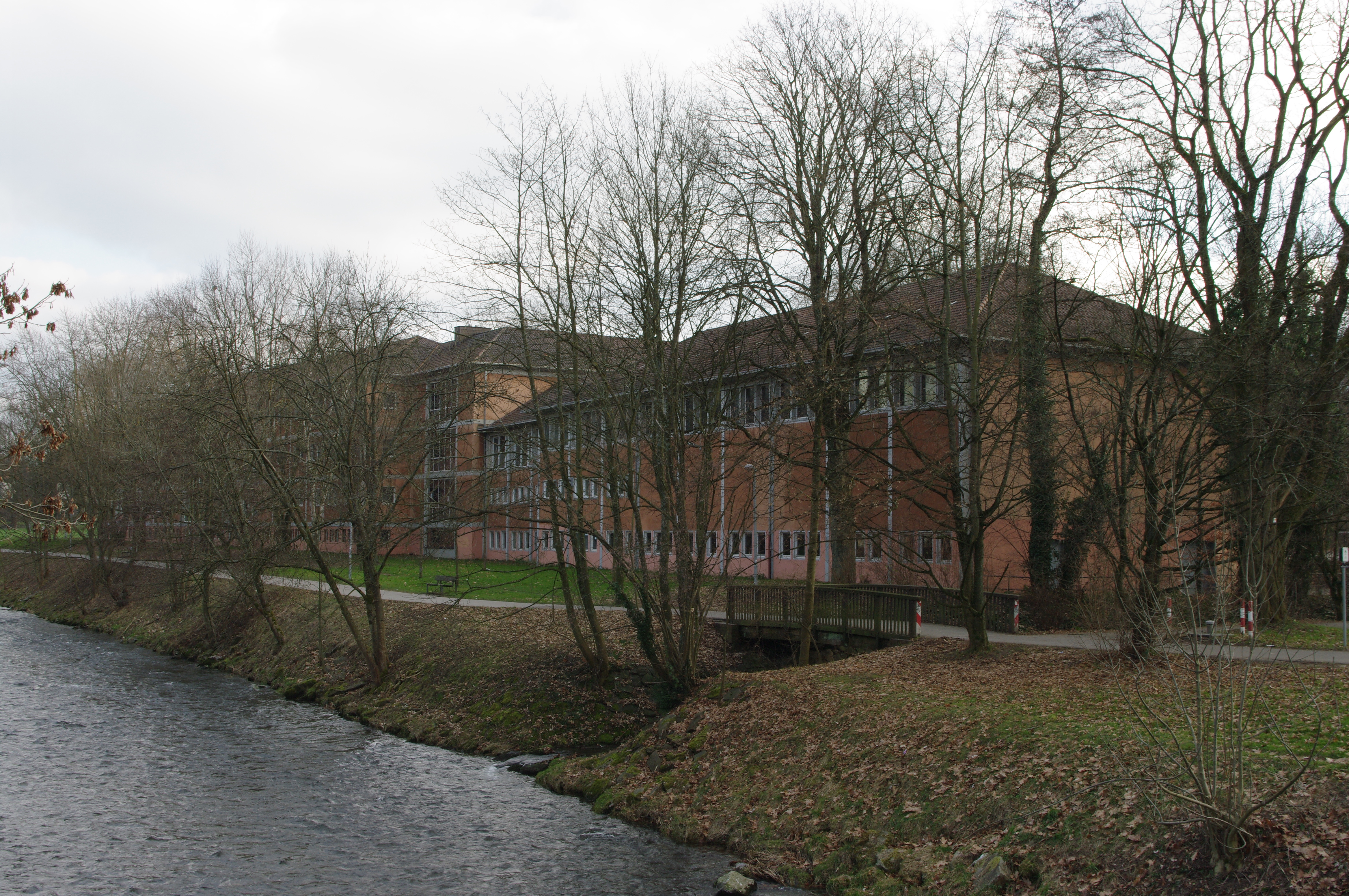 Blick auf die Sporthalle und Rückseite des Bertholdgymnasiums an der Dreisam. Der öffentliche Teil entlang der Dreisam wird im Rahmen der Sportunterrichts intensiv genutzt.